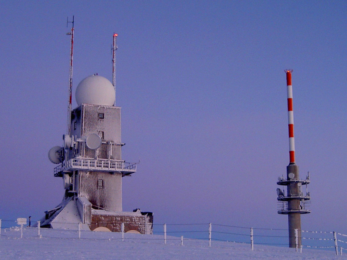 Feldberg (Schwarzwald) Radarstation und Turm